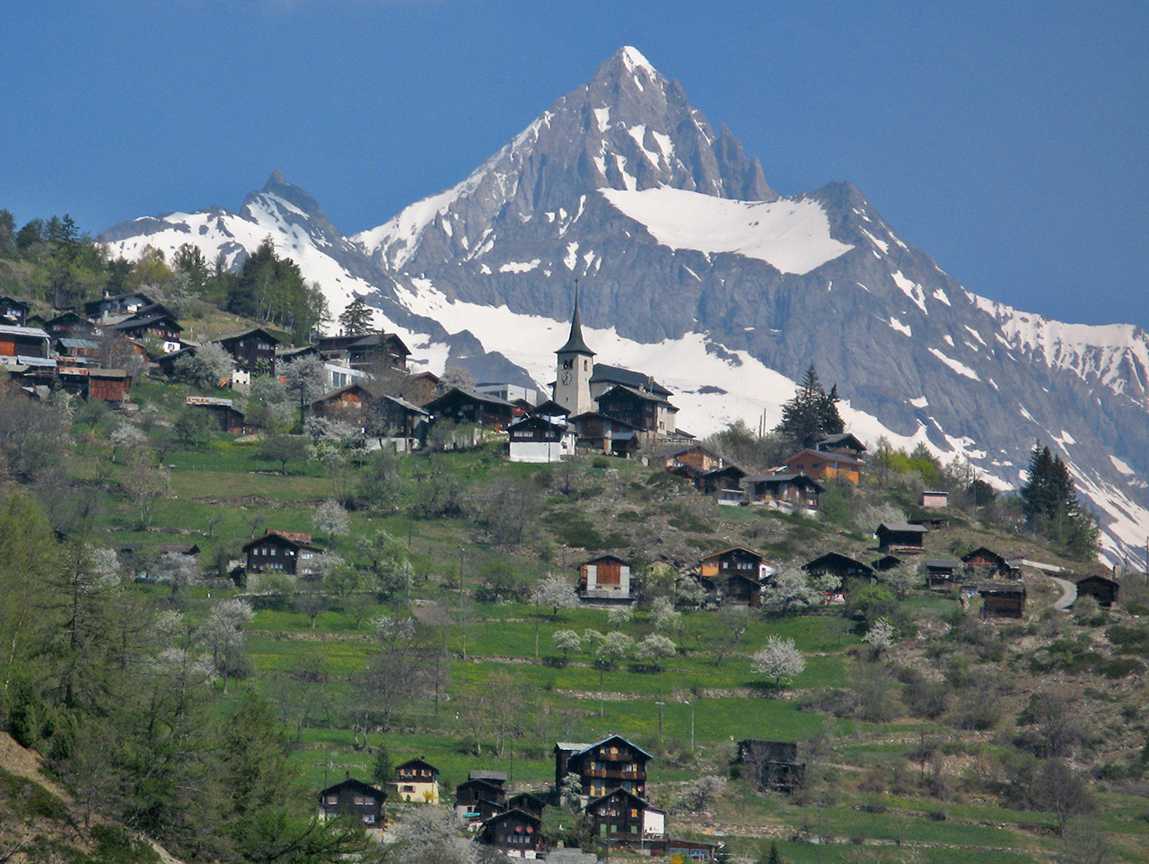 Zeneggen mit Bietschhorn (Aufnahmestandort Eschacker)